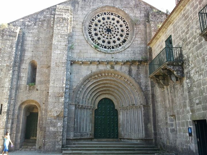 fachada del monasterio de armenteira donde se aprecia el precioso arco de medio punto